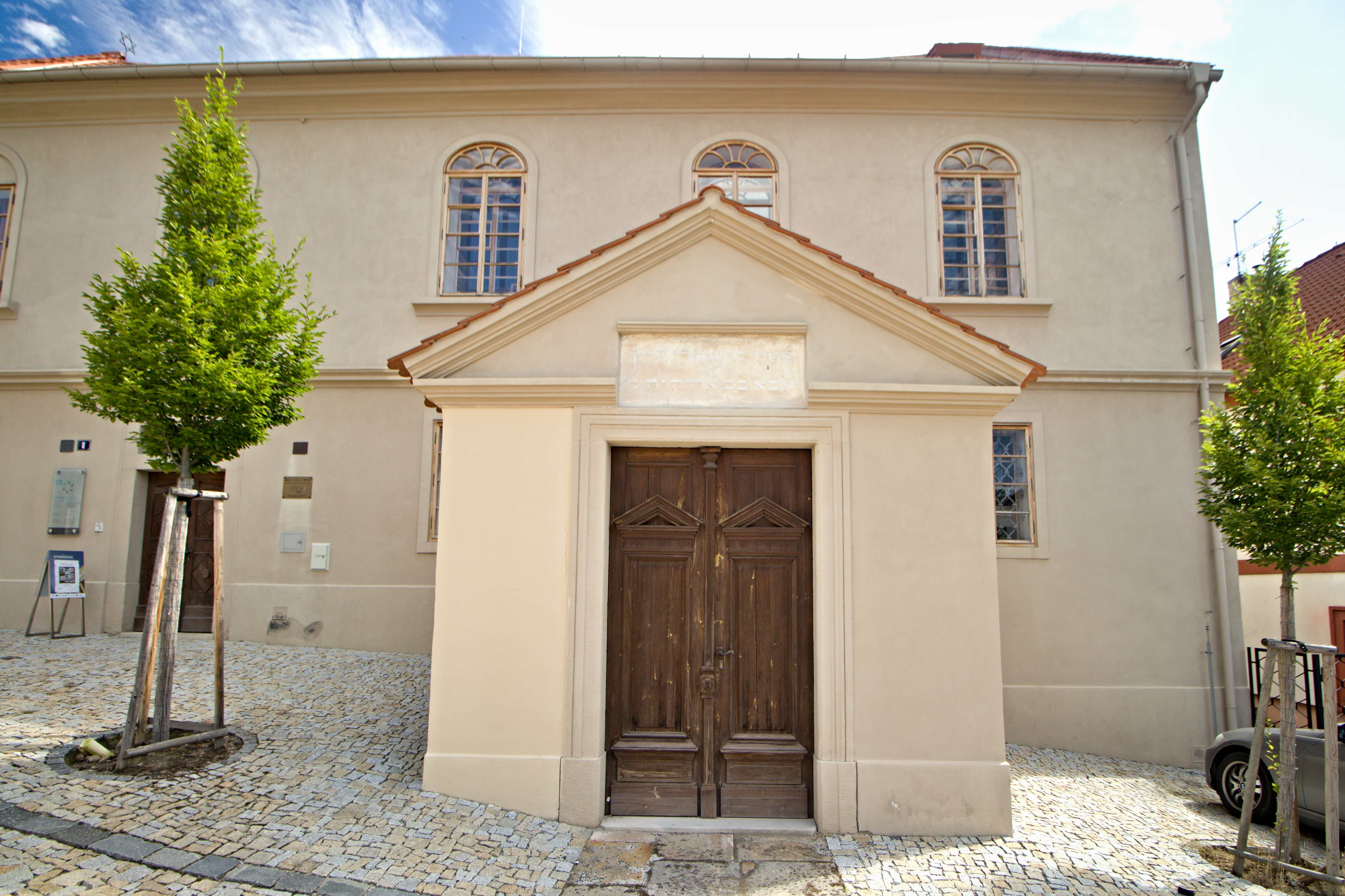 Brandýs nad Labem